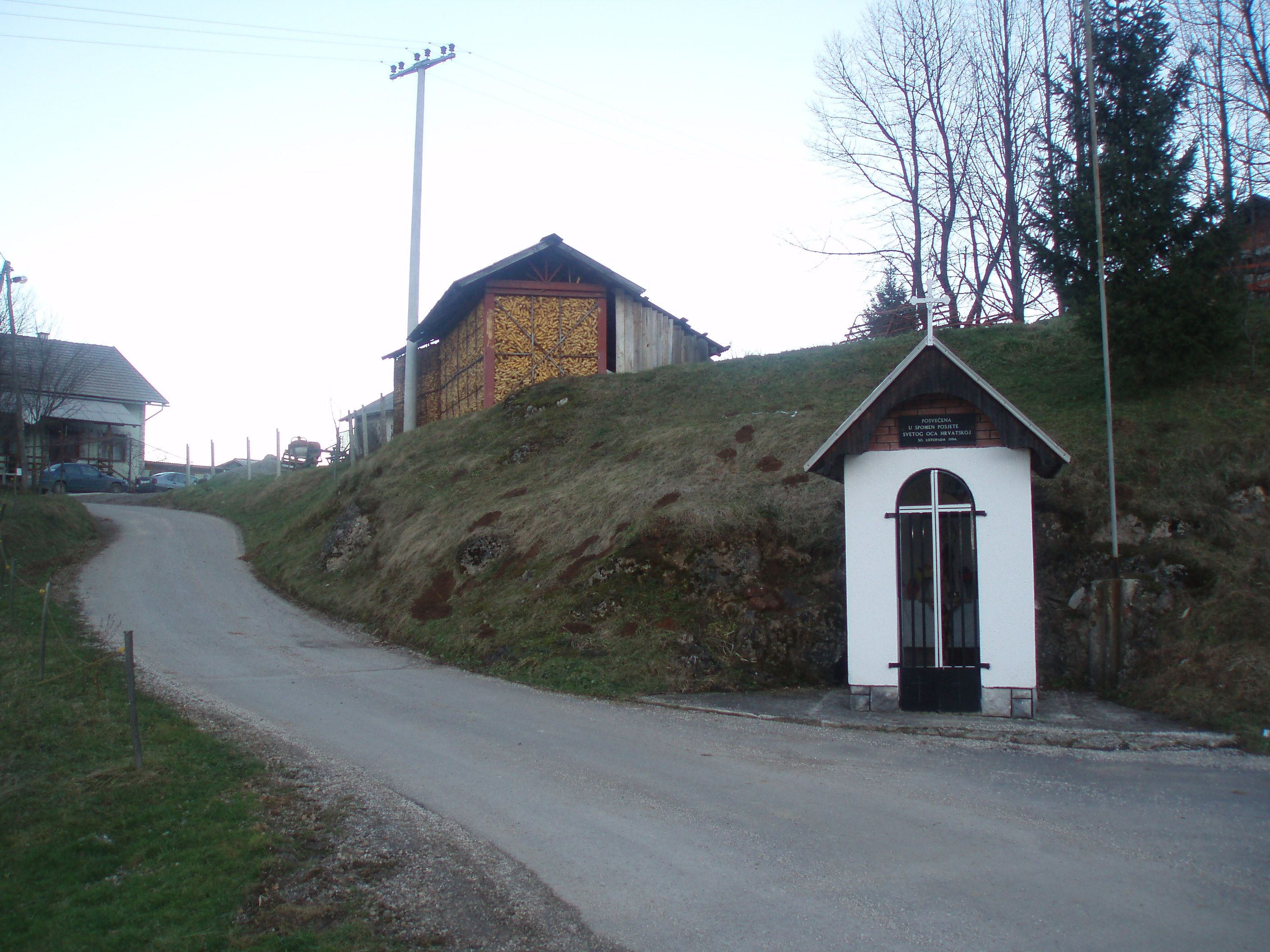 Carevo Polje